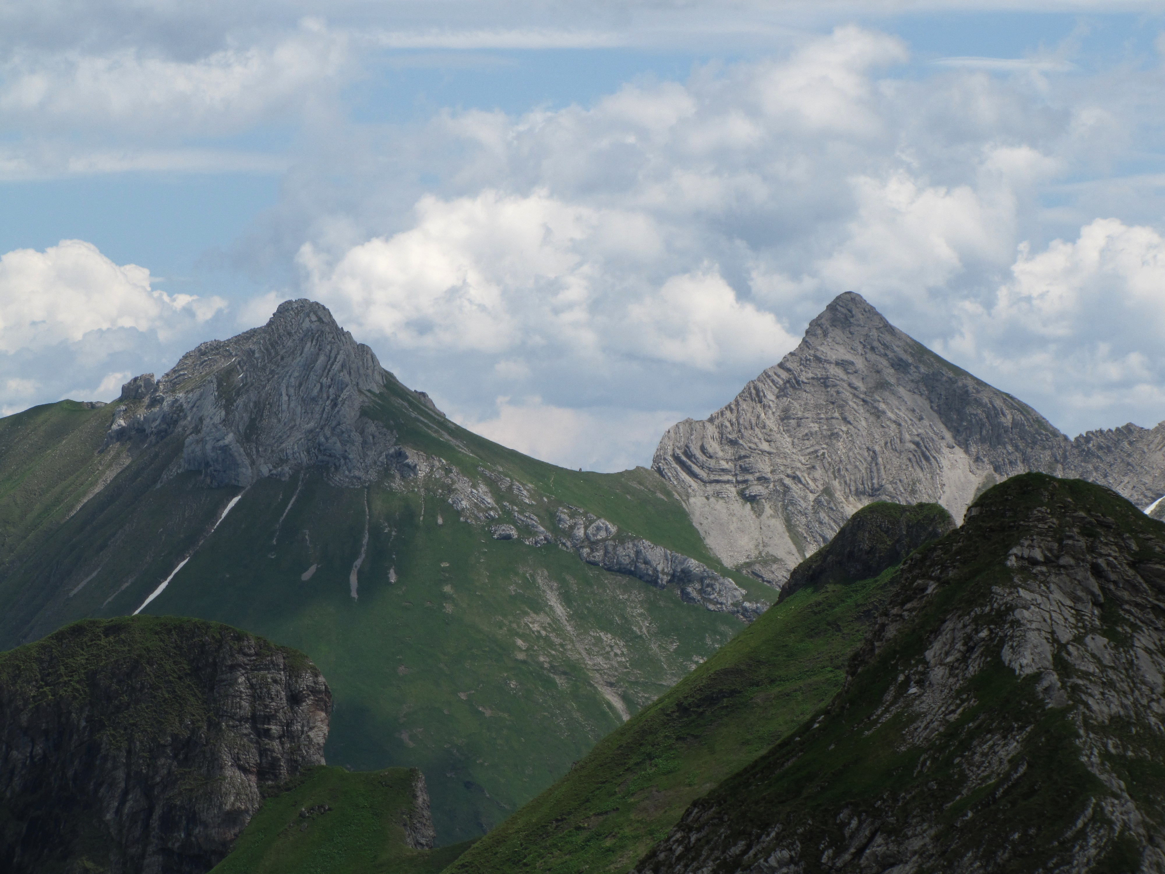 Blick vom Aufstieg zum Schochen nach Osten zum Glasfelderkopf (2270 m) und zur Kesselspitze (2284 m).